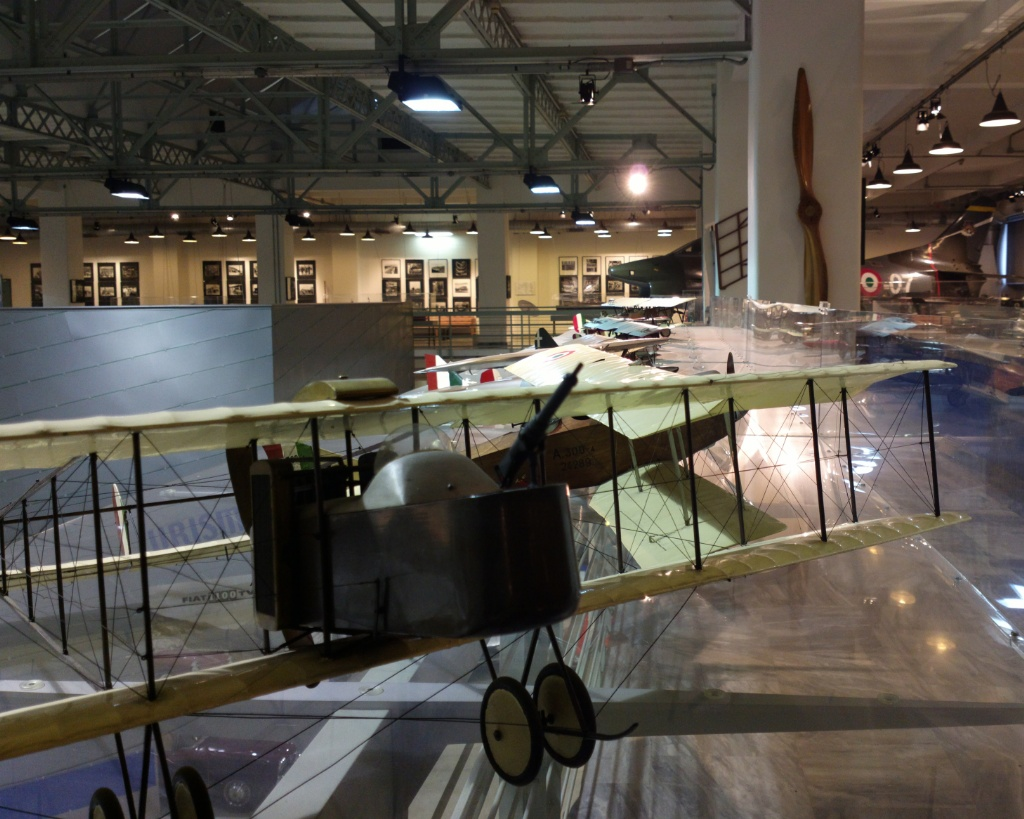 modellini aviazione e Fiat G91 Centro Storico Fiat